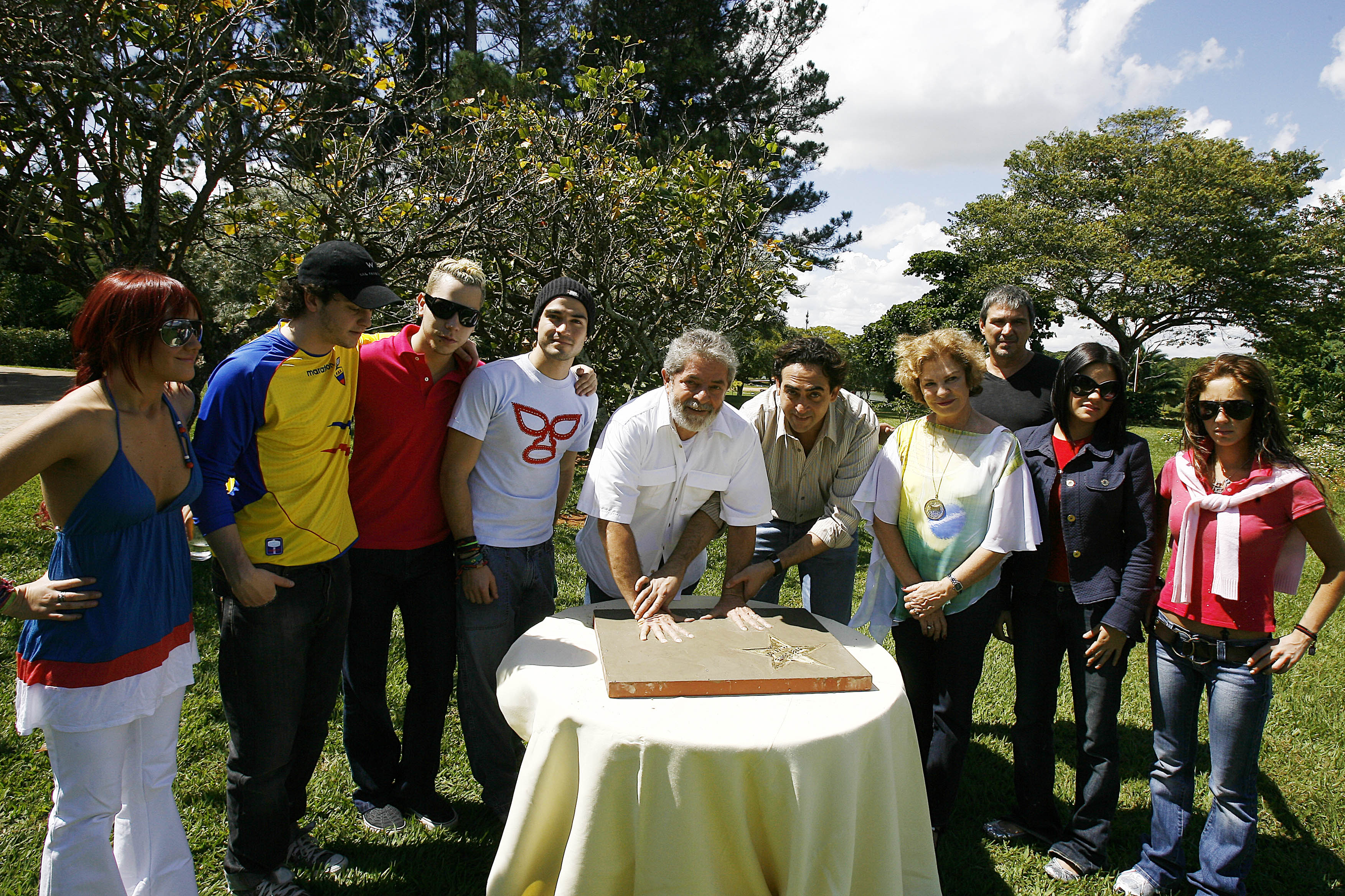 Presidente Lula coloca as mãos em forma da "Calçada da Fama", que também terá a assinatura do grupo mexicano RBD. O painel deve ficar exposto no Museu da Música, em construção na capital federal.